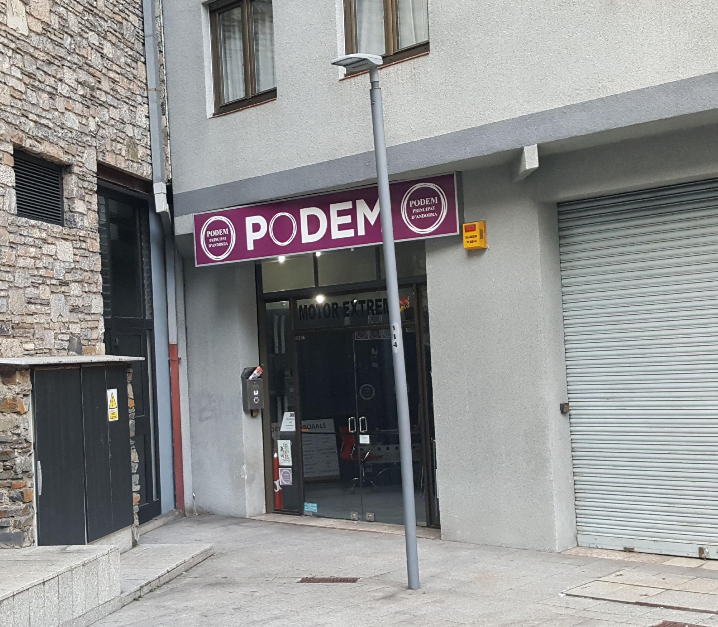 Seu/oficina de Podem al Principat d'Andorra